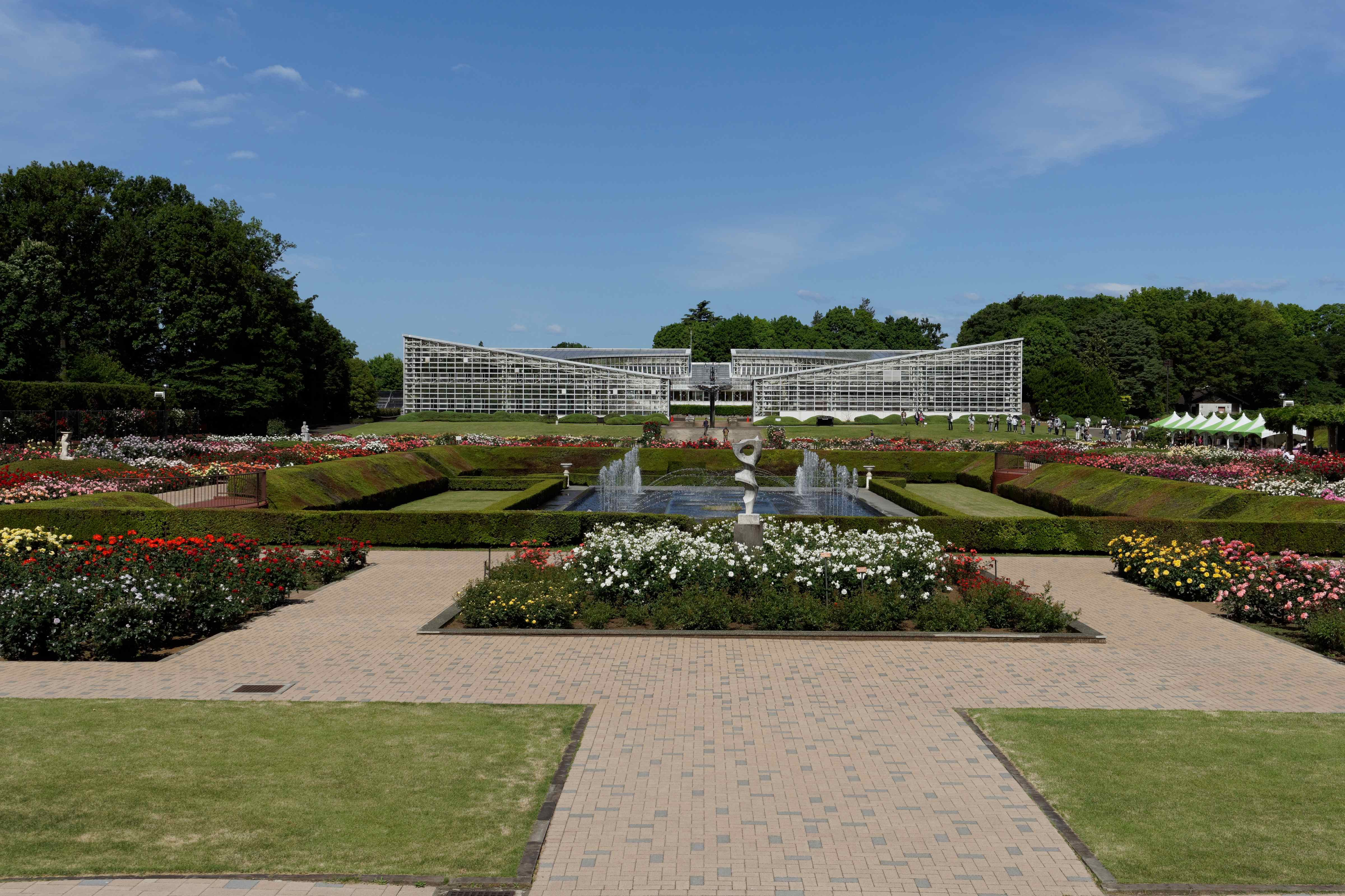 神代植物公園 ばら園